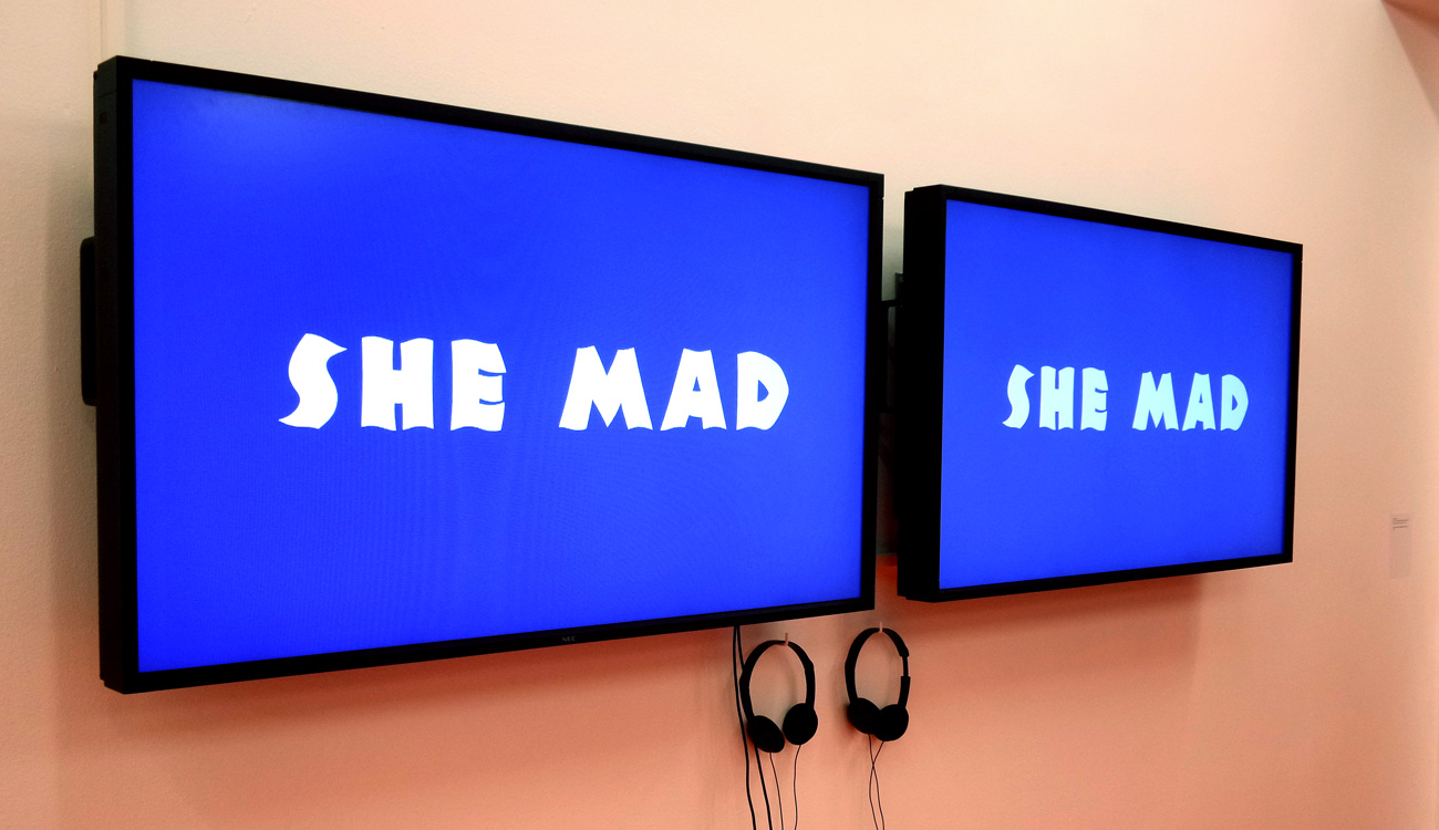 photo de la video S1:E1, A Pilot For a Show About Nowhere à la Index Foundation, Stockholm